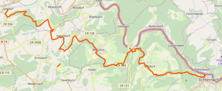 Streck vum Maurice Cosyn-Pad